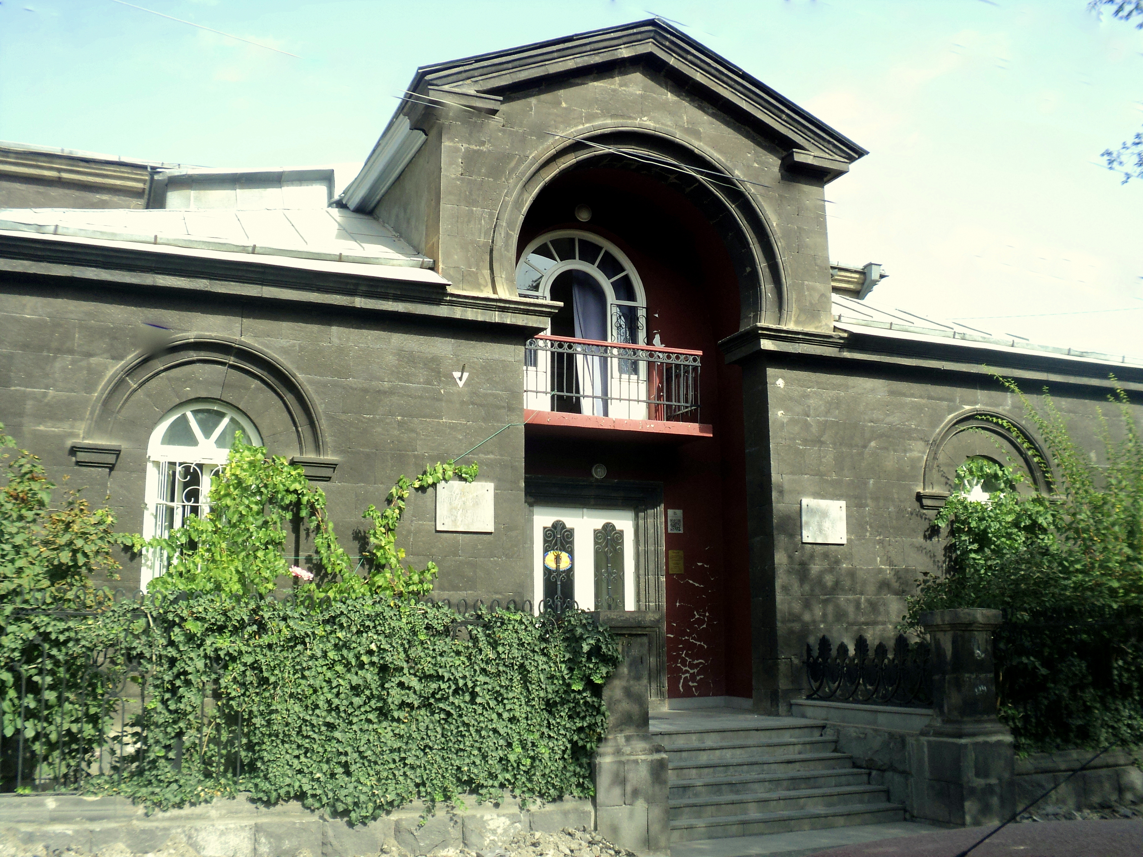 Ավետիք Իսահակյանի տուն-թանգարան